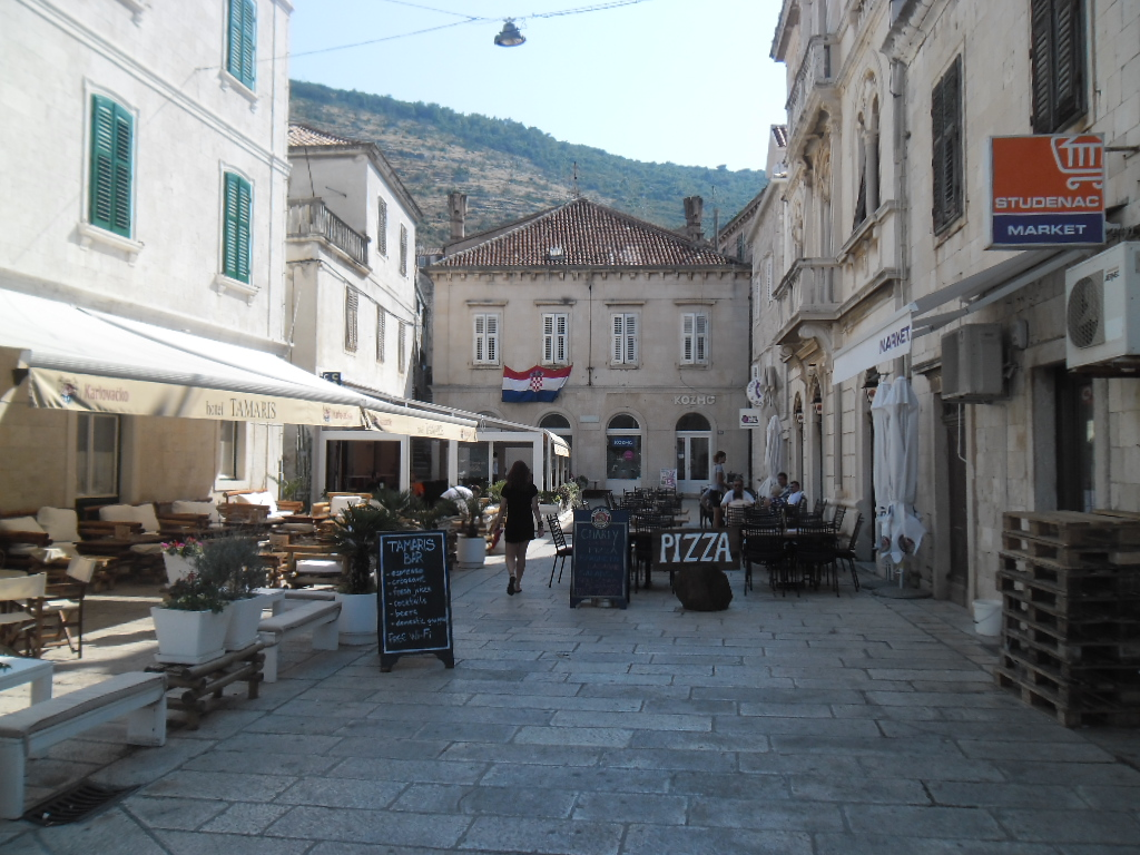 grad Vis